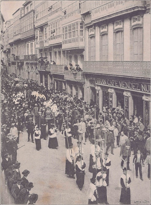 Fotograma da película Entierro de Sánchez Bregua de José Sellier.